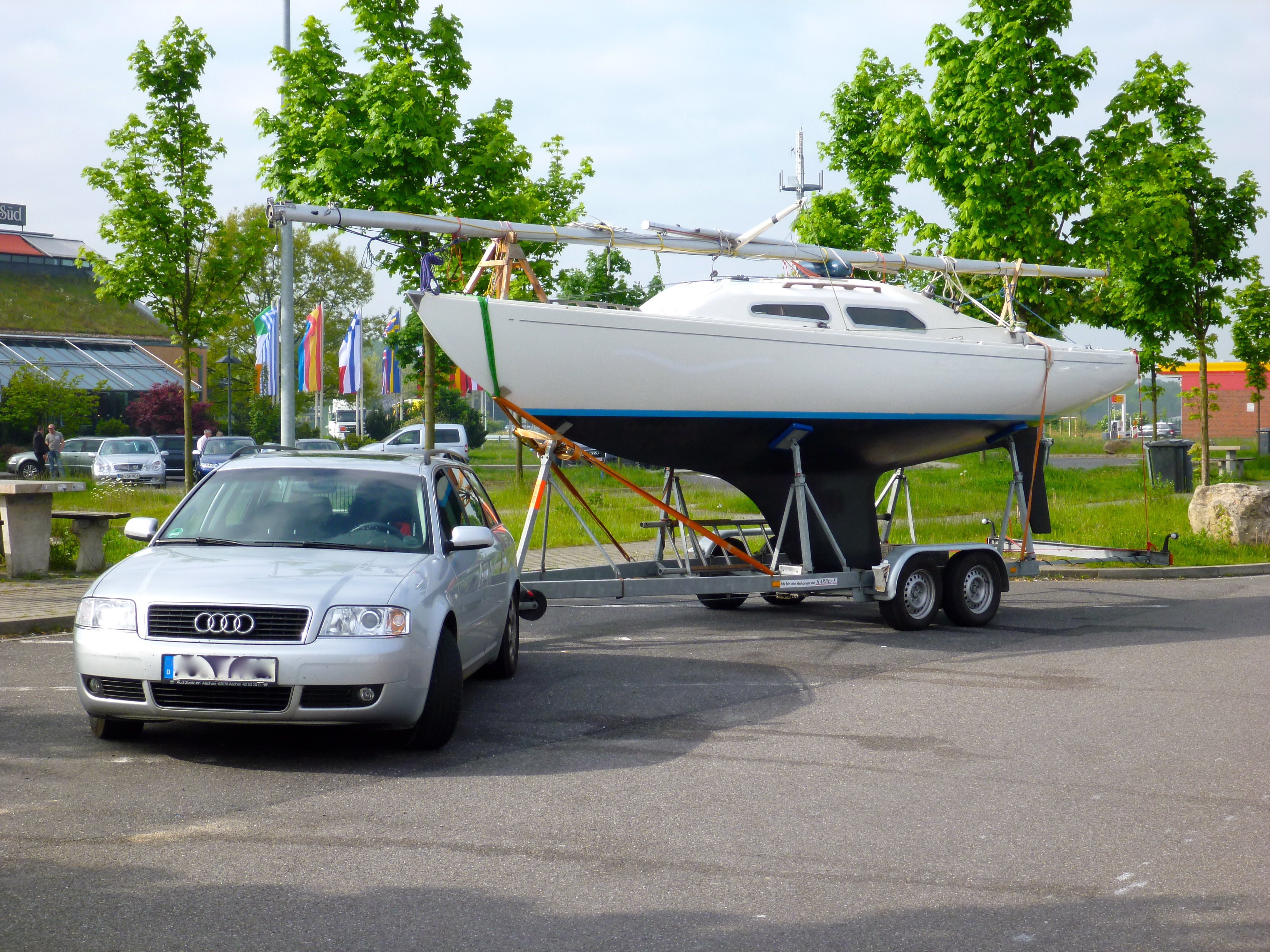 Straßentransport eines H-Bootes auf Bootsanhänger mit Tandemachse